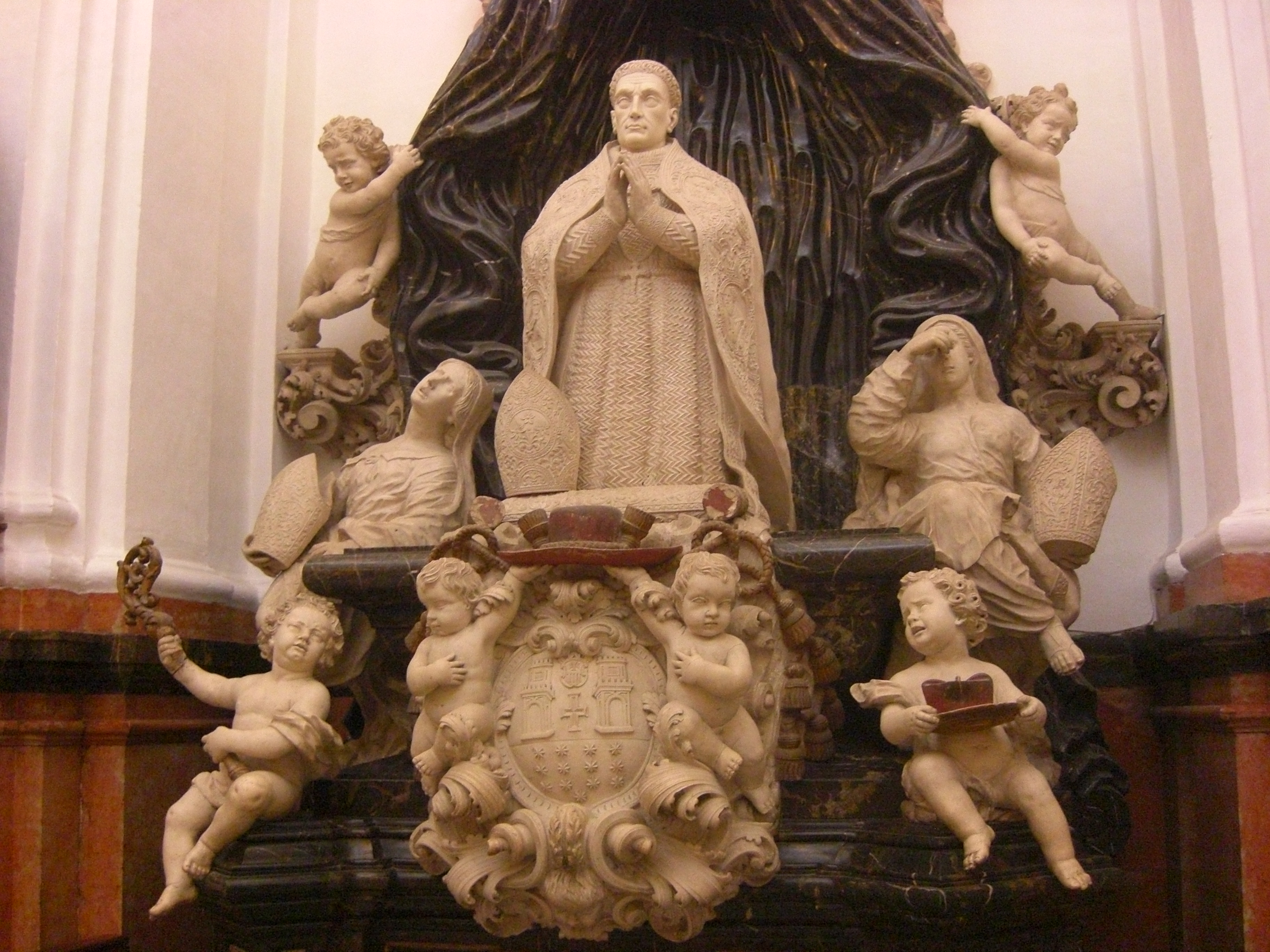 Sepulcro del Cardenal Salazar en la capilla de Santa Teresa de la Mezquita de Córdoba, (España)